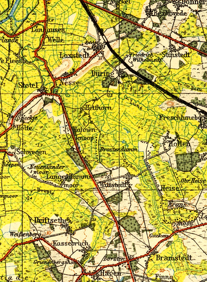 Reichsstraße 6 zwischen Wulsdorf und Hagen im Bremischen.